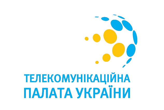 Офіційний логотип